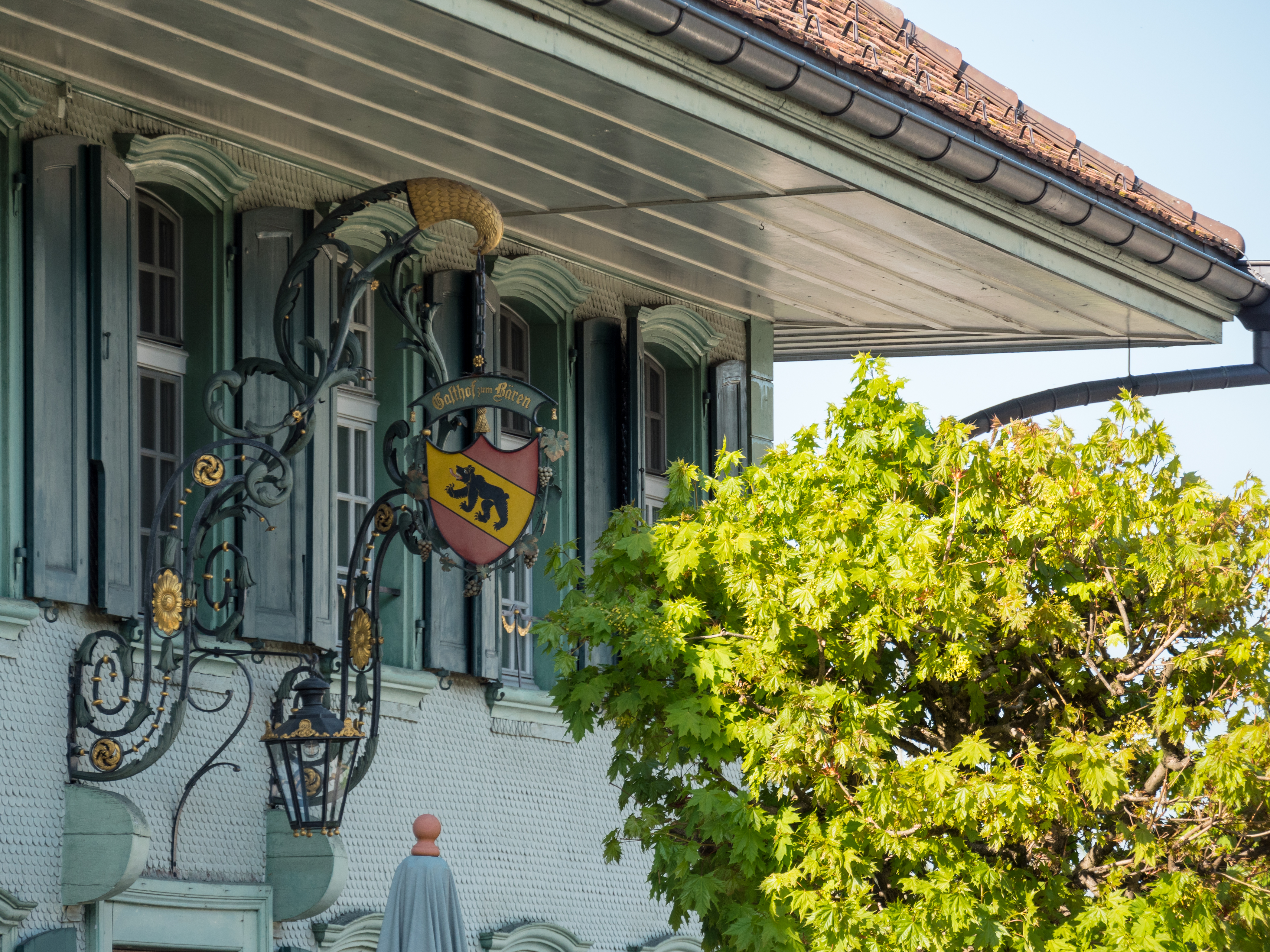 Wirtshausschild des "Gasthof zum Bären" in Dürrenroth